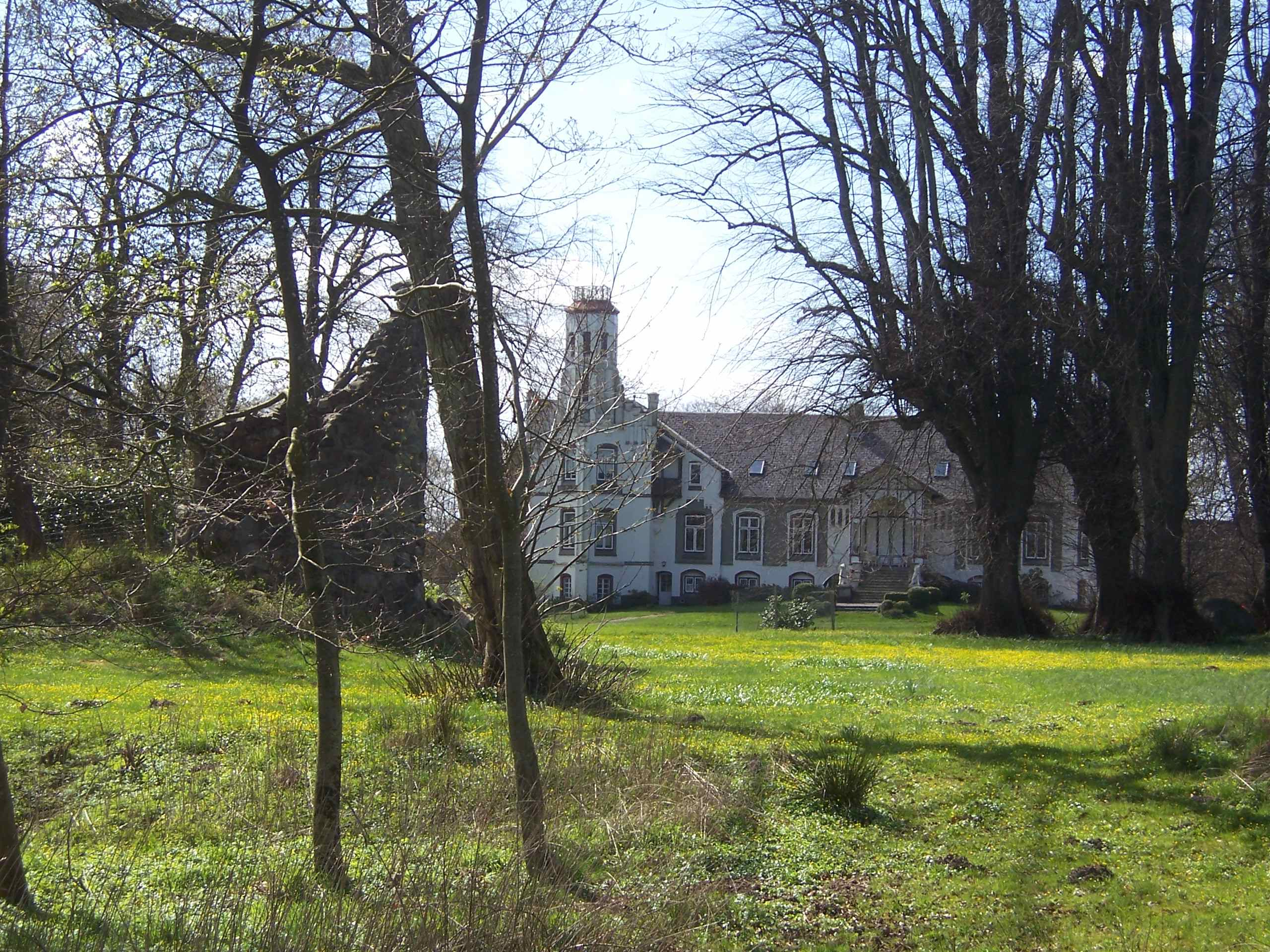 Hohenstein Lindendom und künstliche Ruine